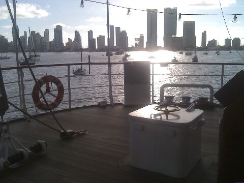 Vista de la Bahìa de Cartagena desde la Cubierta de toldilla del BAP Uniòn